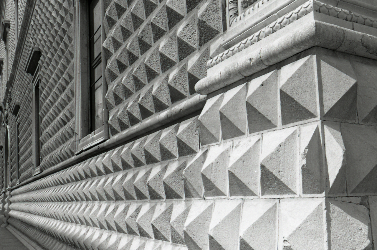 Servizio fotografico : Ferrara, 1969 / Paolo Monti. - Strisce: 7, Fotogrammi complessivi: 37 : Negativo b/n, gelatina bromuro d'argento/ pellicola ; 35 mm. - ((I fotogrammi hanno una doppia numerazione. . - Sul portanegativi: Nikon FP4. - Occasione: Documentazione per la pubblicaizone di: "Renzo RENZI (a cura di), Ferrara, Bologna, Edizioni Alfa, 1969". - (1969). - Fonte: Agenda di Paolo Monti: Monti - Agenda 1969 (1969), presso Archivio Paolo Monti. - Fonte: Agenda di Paolo Monti: Monti/ 3 aprile 1966 - 9 marzo 1971/ 12421-16823 (1966-1971), presso Archivio Paolo Monti. - Fonte: Monografia di Renzi, Renzo: Ferrara, Bologna, Edizioni Alfa